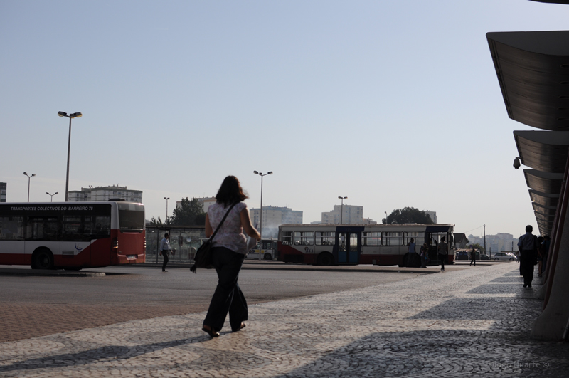 Barreiro_DBD_DSC_7365